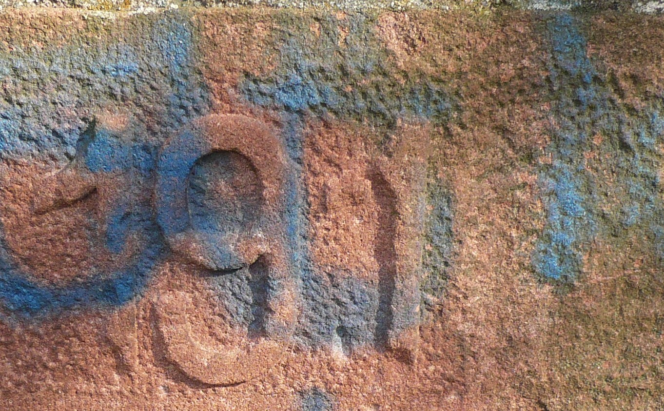 Nowa Ruda, wieża na Górze św. Anny